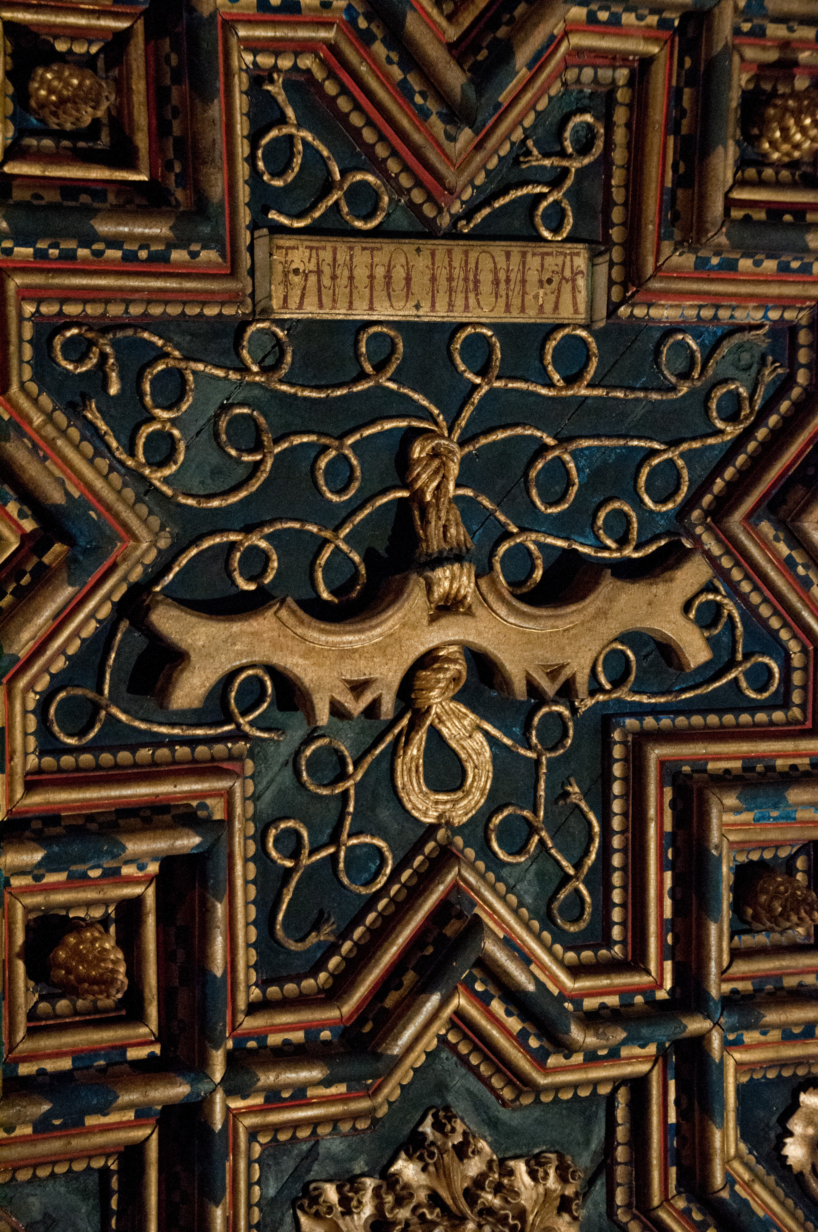 Divisa de Fernando el Católico alusiva al mito del nudo gordiano.